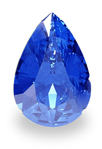 Saphir, in Tropfenform geschliffen